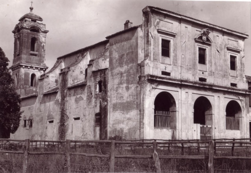 La chiesa di San Paolo apostolo di Tor Tre Ponti adibita a fienile prima del ripristino del 1934